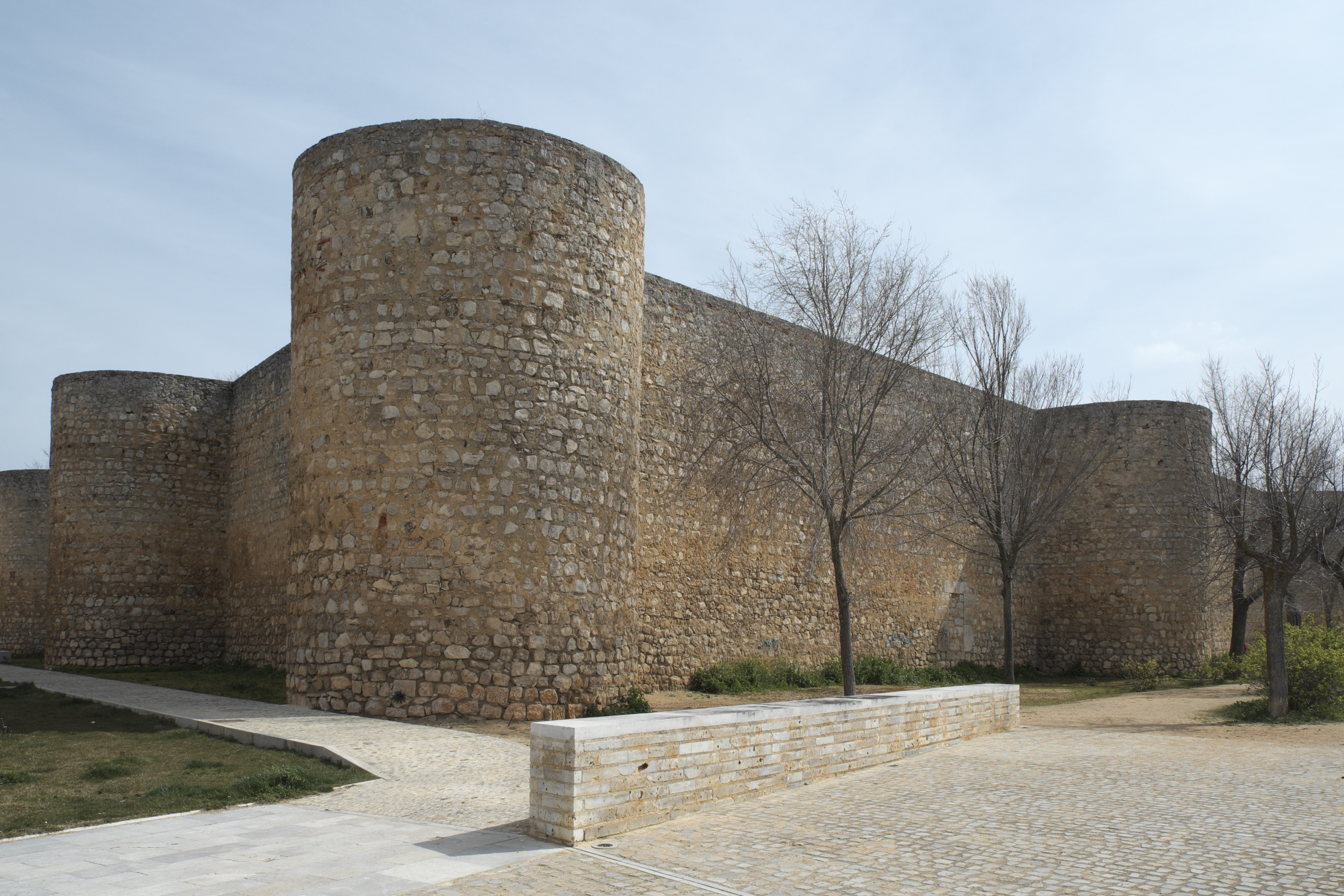 Alcázar von Toro in der Provinz Zamora (Kastilien-León/Spanien), aus dem 10. Jh.